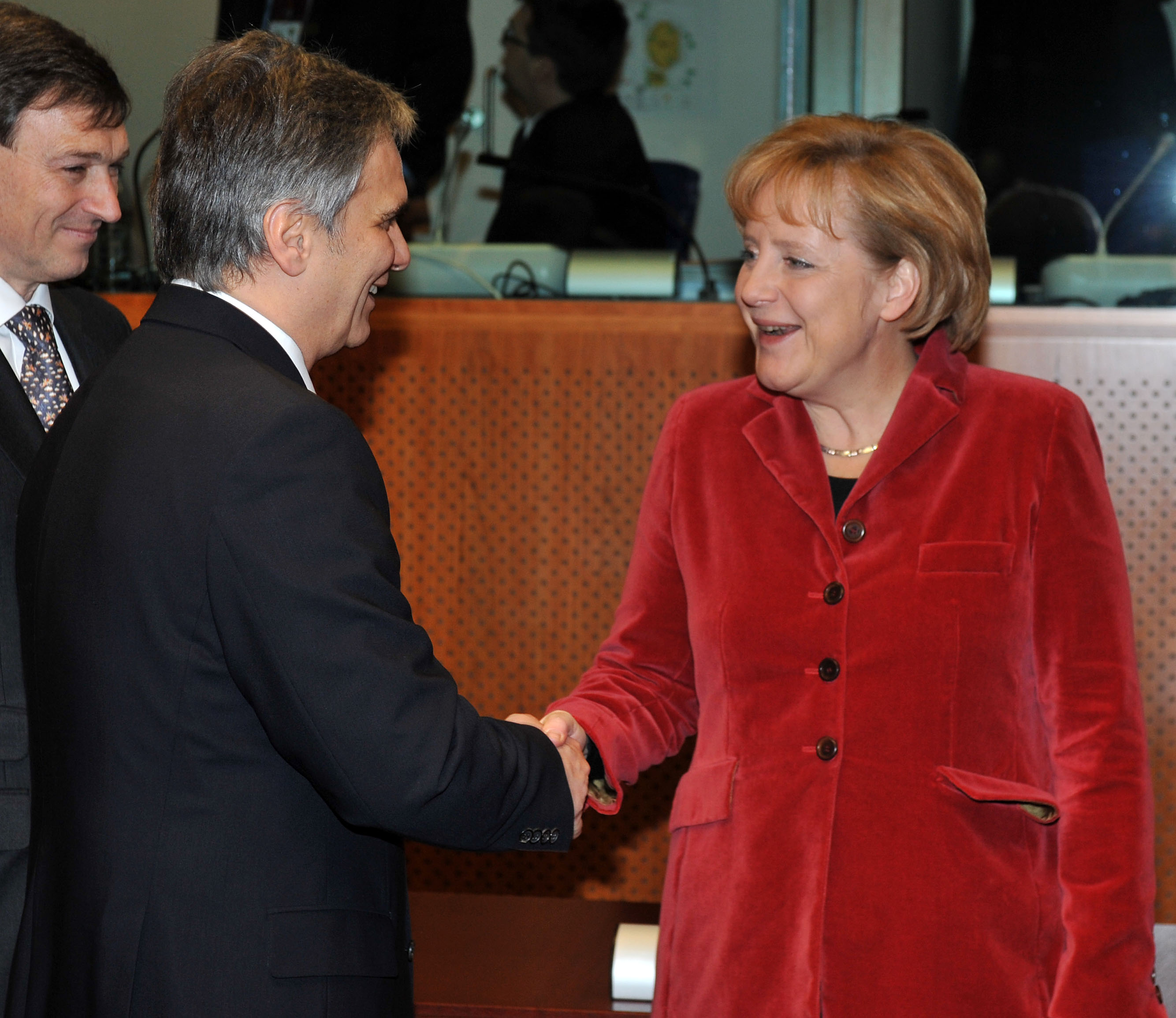 Donnerstag, den 11. Dezember 2008 begann in Brüssel die Wintertagung des Europäischen Rates der EU-Staats- und Regierungschefs und Außenminister. Im Bild Österreichs Bundeskanzler Werner Faymann (L) mit der deutschen Bundeskanzlerin Angela Merkel (R). * FotografIn: Bernhard J. Holzner * Quelle: BKA/HOPI-MEDIA